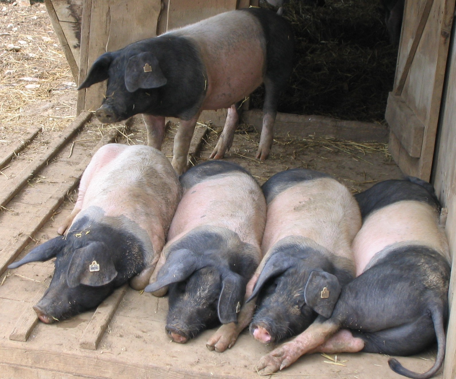 Schwäbisch-Hällische Landschweine im Freilichtmuseum Neuhausen ob Eck